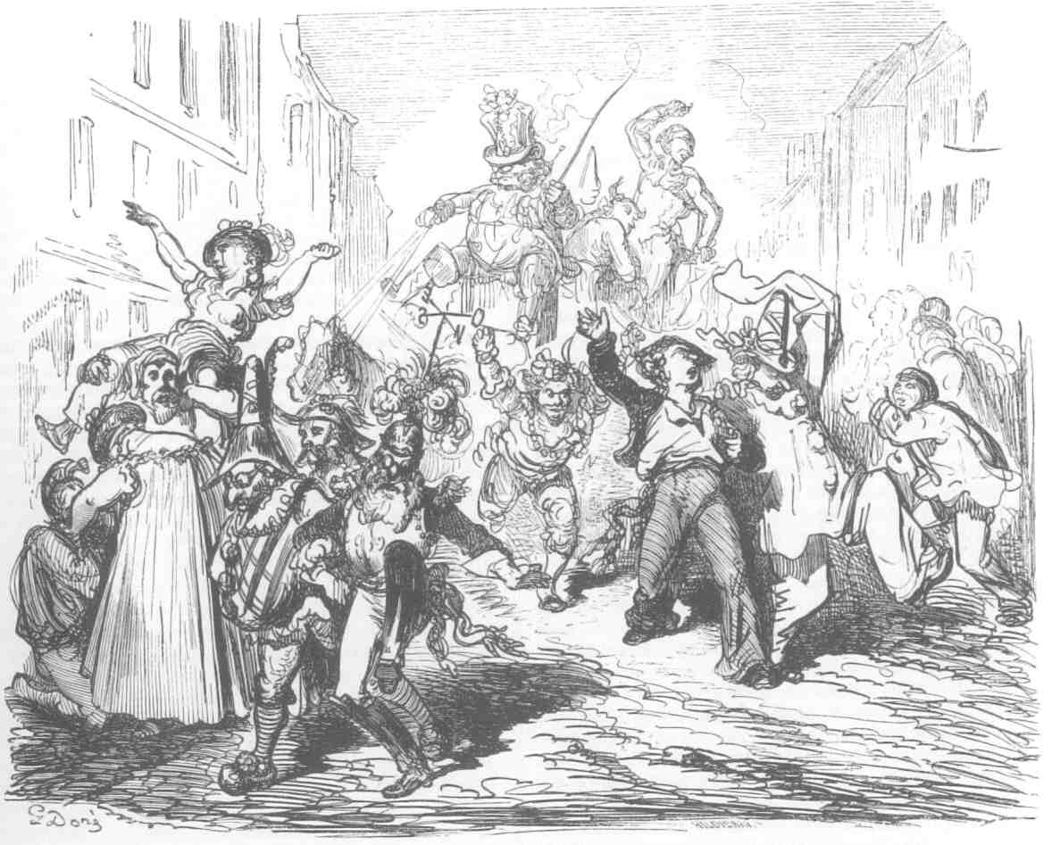 Illustration de Gustave Doré d'un événement carnavalesque parisien célèbre : la descente de la Courtille.